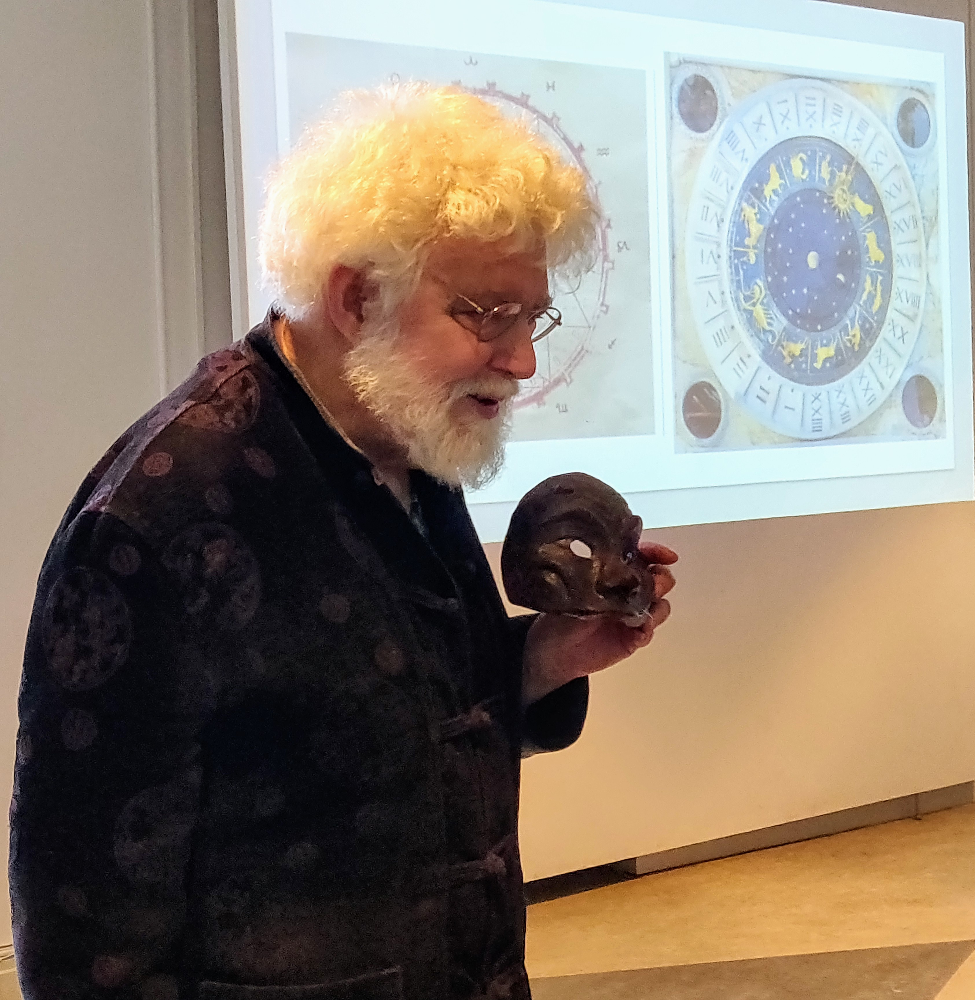 Jan Mark på Landskrona Museum 29 Februari 2020